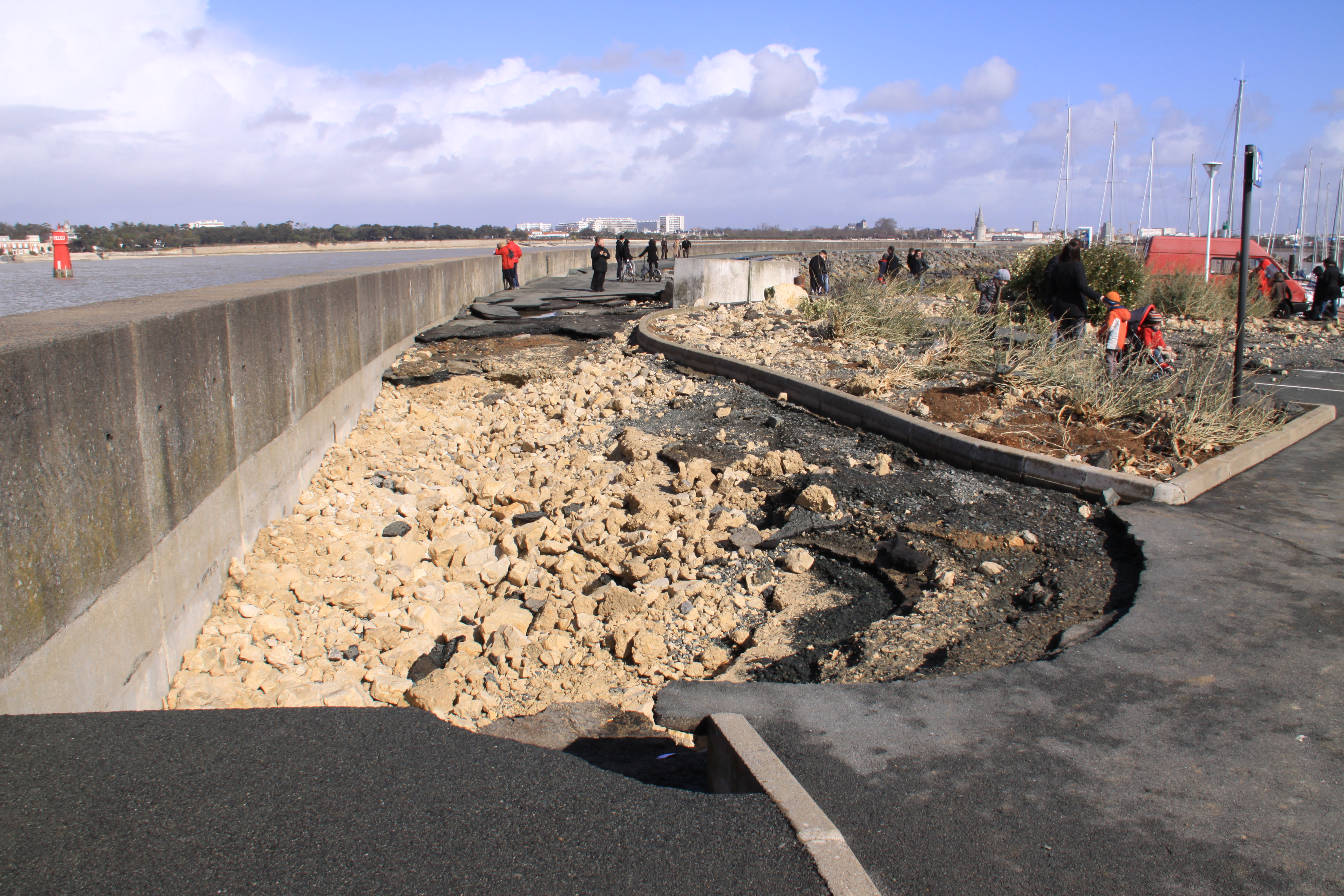 Dégâts au Port de Plaisance des Minimes à La Rochelle après le passage de la tempête Xynthia dans la nuit du samedi 27 au dimanche 28 février 2010: trottoir détruit au parking de la Digue Lazaret. La Rochelle, Charente Maritime, France.